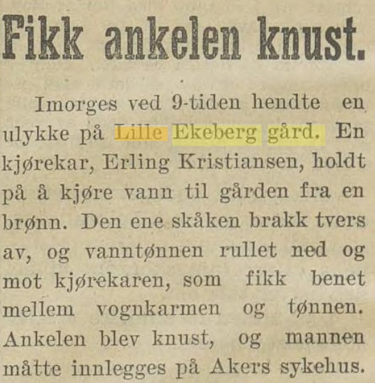 Notis i Arbeiderbladet 26. juni 1932